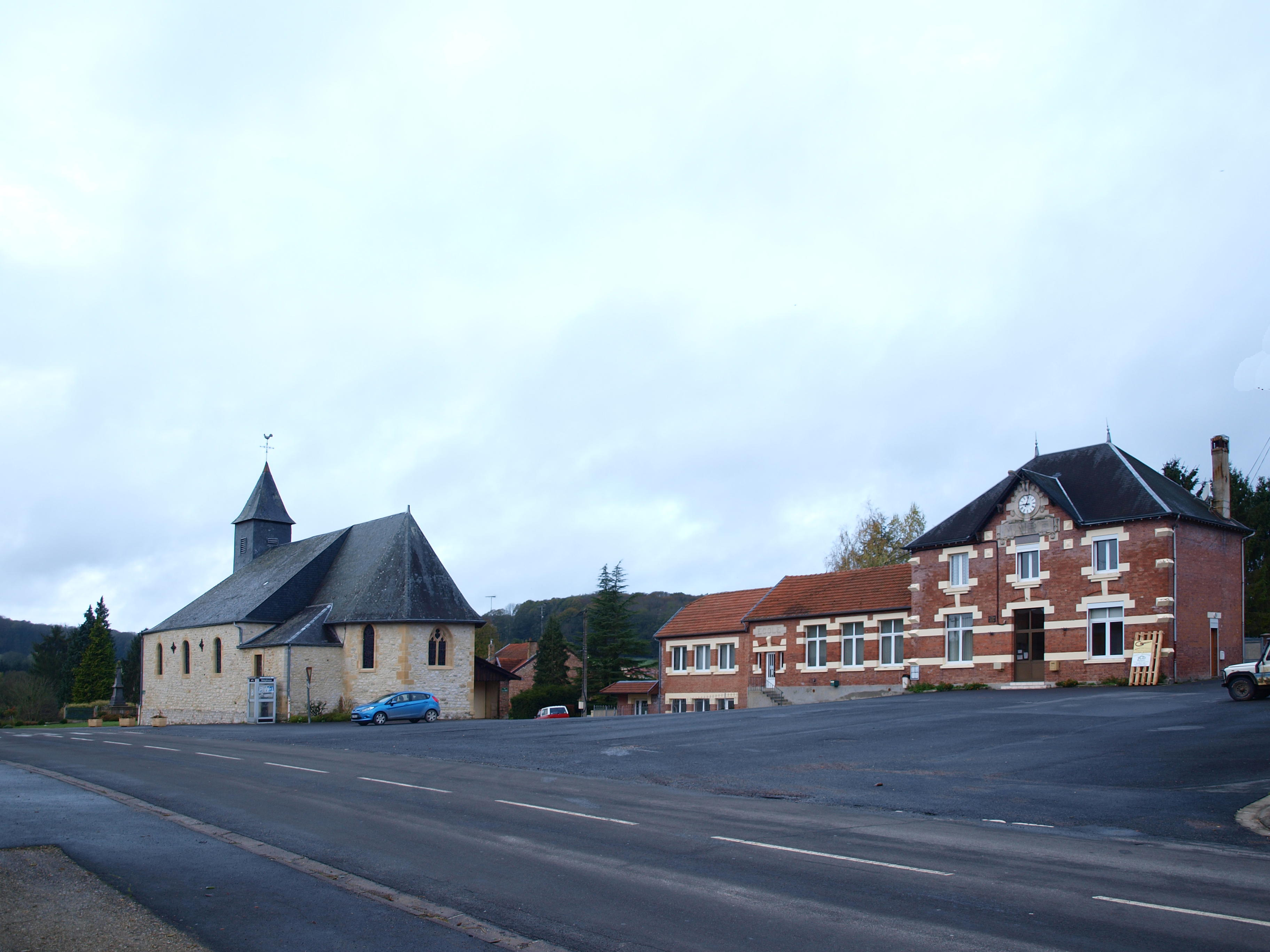 Quatre-Champs (Ardennes, France) ; mairie & église, la place & le RD 977